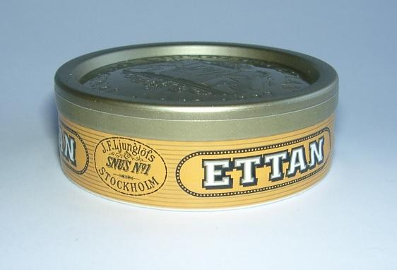 A box of Ettan. (radera) (nuvarande) 26 april 2005 kl.10.21 . . Chrizz (Diskussion) . . 562x382 (23455 bytes) (Bild på en snusdosa till artikeln Ettan. Foto: :Användare:Chrizz GFDL )